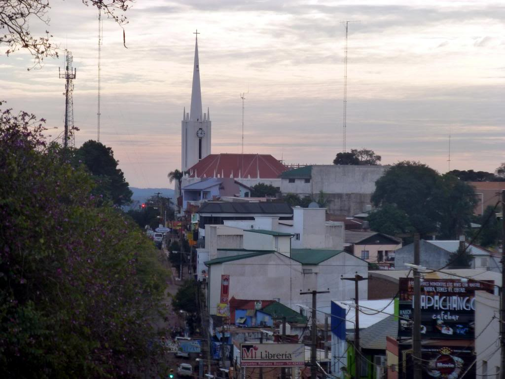 Ciudad de Obéra